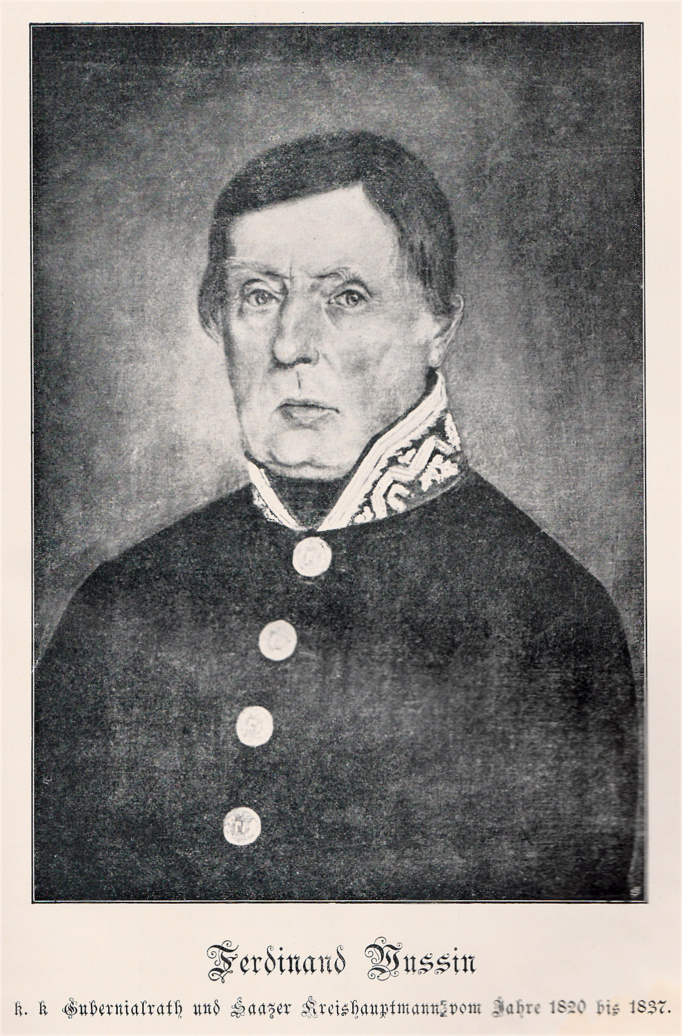 Ferdinand Wussin (1771–1848), k. k. Gubernialrat und Kreishauptmann des Saazer Kreises von 1820 bis 1837